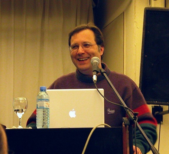 El periodista argentino Alejandro Agostinelli